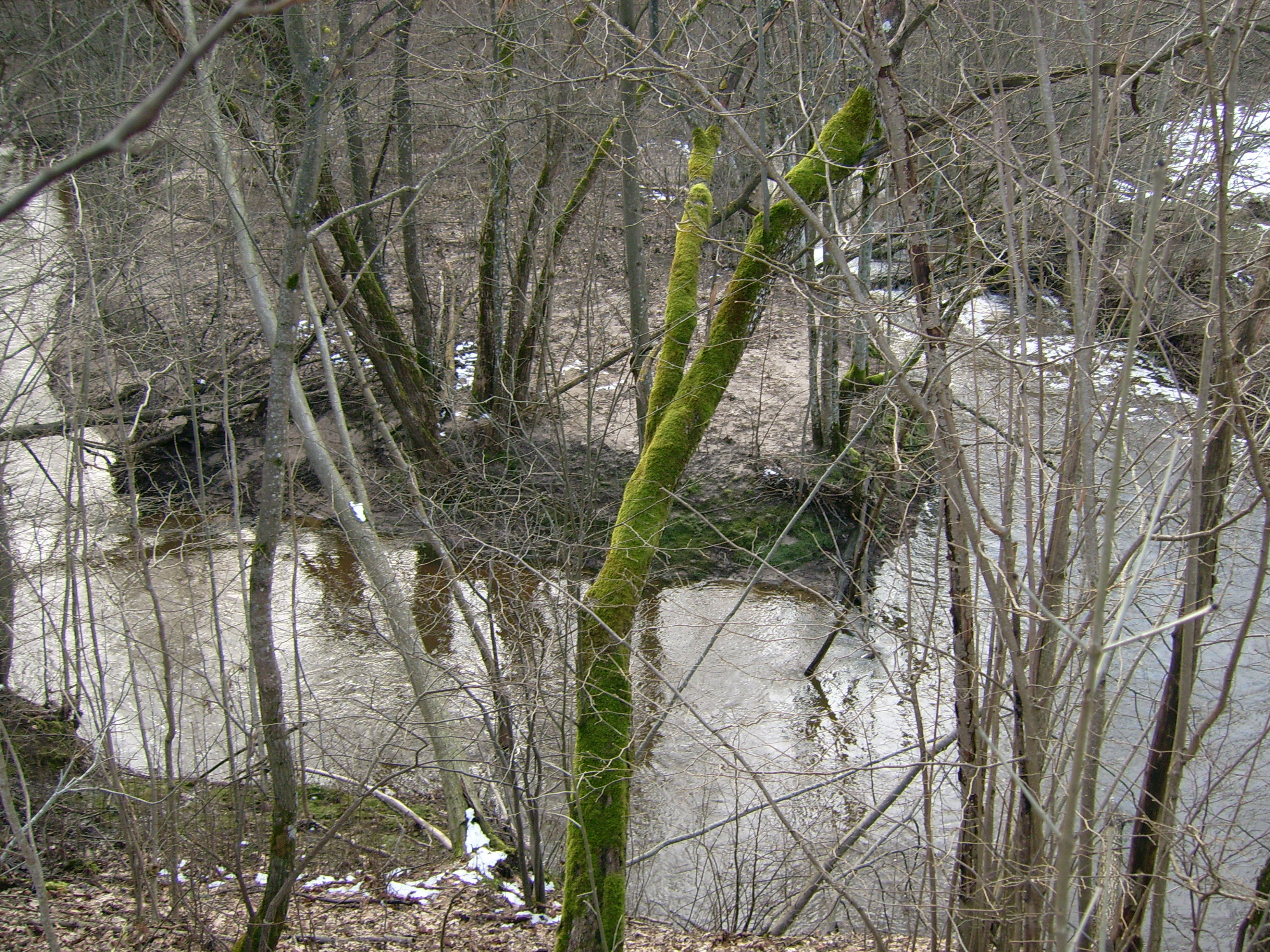 Irtuona ties Sutkais